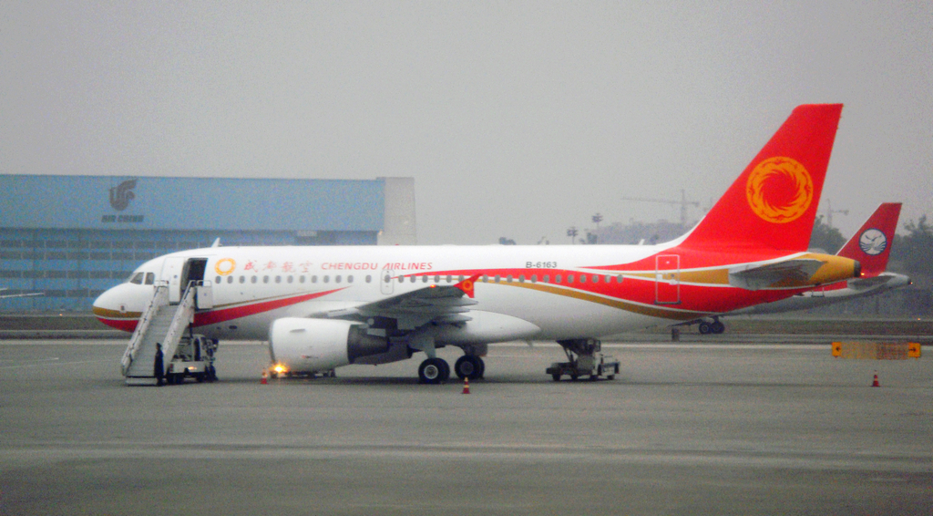 中文（中国大陆）: 成都航空首航班机